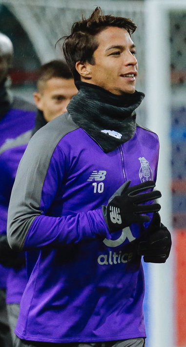 Икер Касильяс вместе с «Порту» готовится к матчу с «Локомотивом»